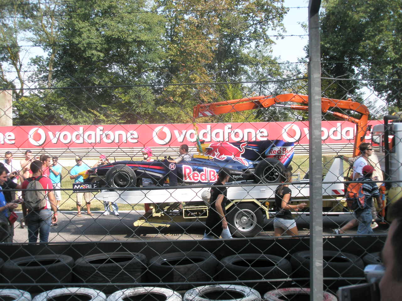 Abtransport des ausgeschiedenen Mark Webbers